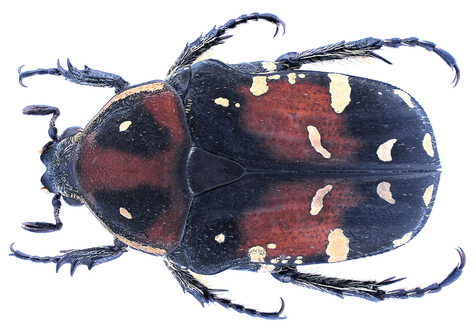 Familie: Scarabaeidae Grösse: 15 mm Verbreitung: China Fundort: China, Hupeh-Prov., Dabie Shan, Luotian Village leg. 2007; det. U.Schmidt, 2007 Foto: U.Schmidt, 2007